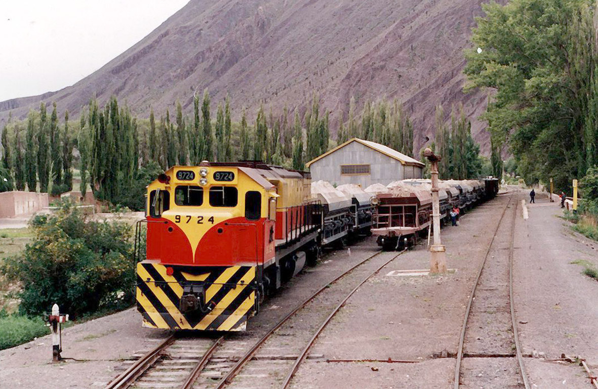 Un tren de carga en la estación Ingeniero Maury, provincia de Salta, sobre el ramal C.14. Año 1993.9724 Ingeniero Maury